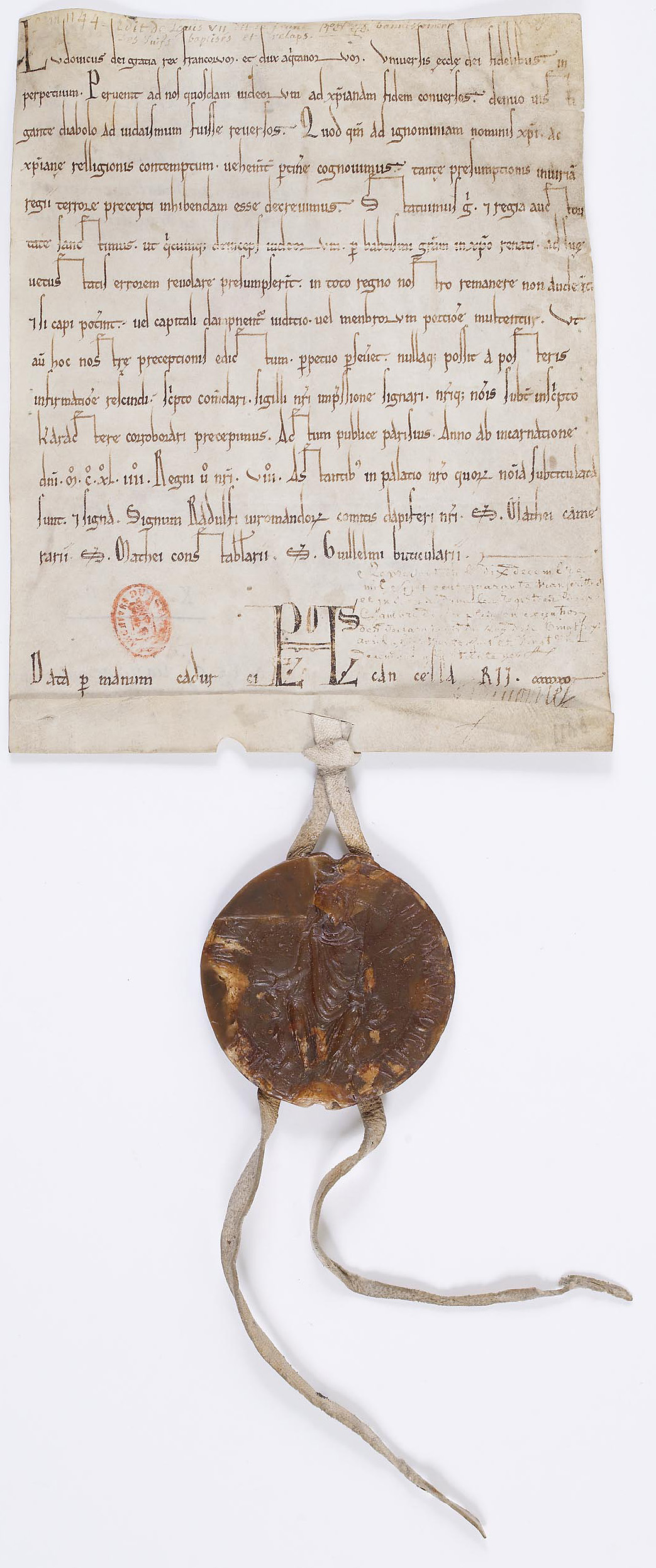 Edit du roi de France, Louis VII, banissant du royaume les juifs relaps sous peine de mutilation ou de mort. Paris, 1144-1145.